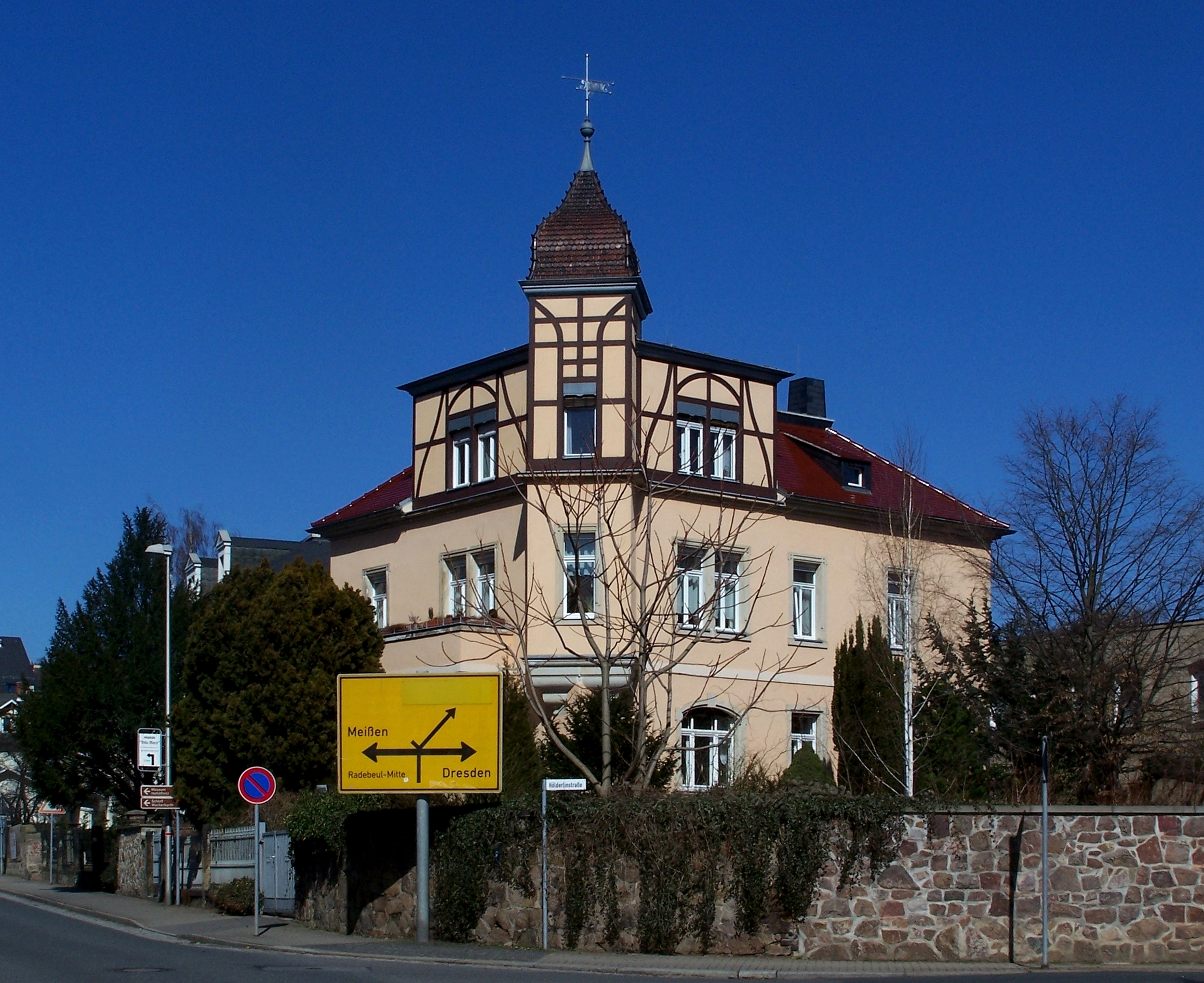 Schildenstr 6 in Radebeul